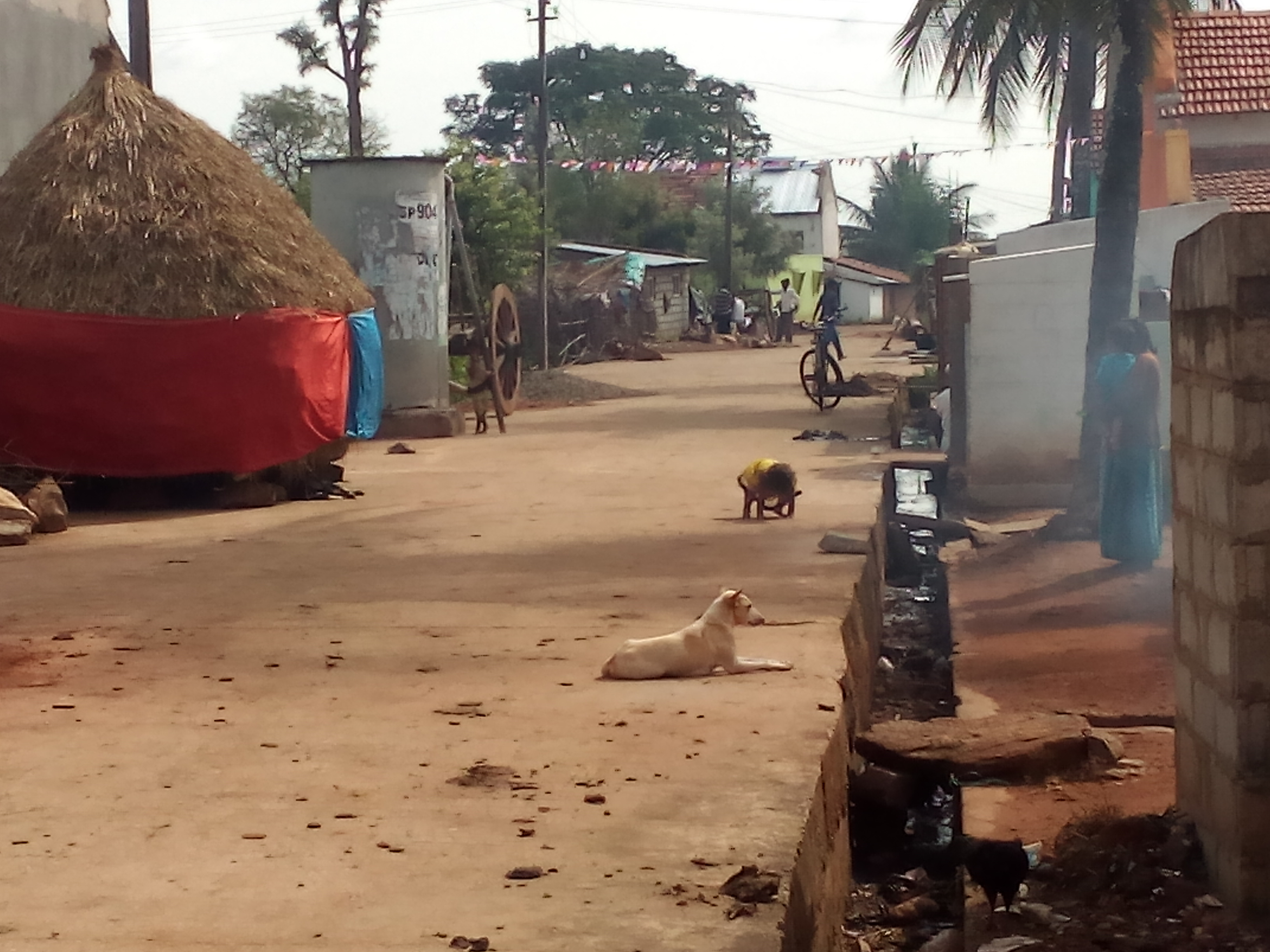 ಕನ್ನಡ: ಹಳೇಹೆಗ್ಗುಡಿಲು ಗ್ರಾಮದ ಒಳನೋಟ